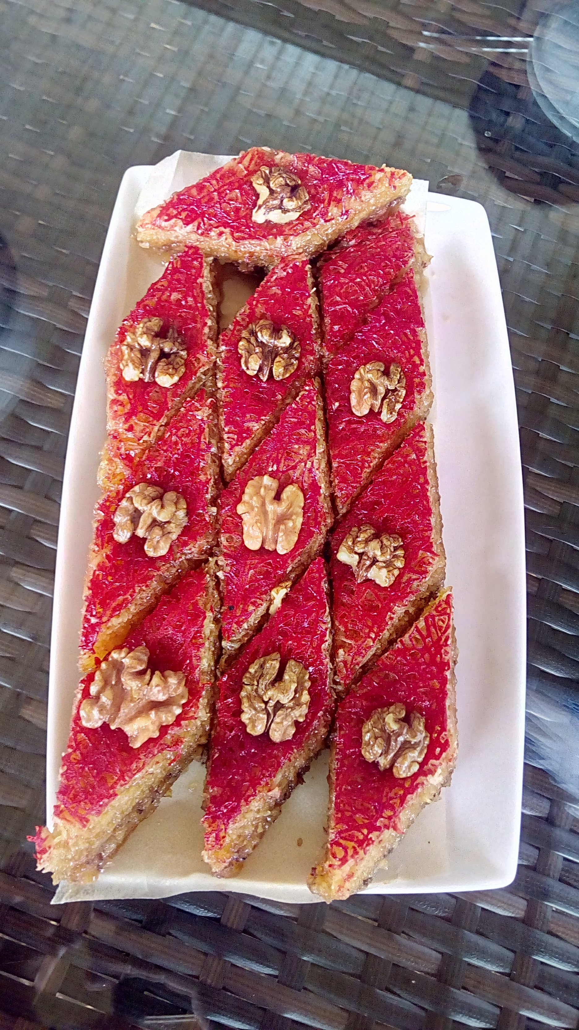 2018 Bahar vikidüşərgəsi